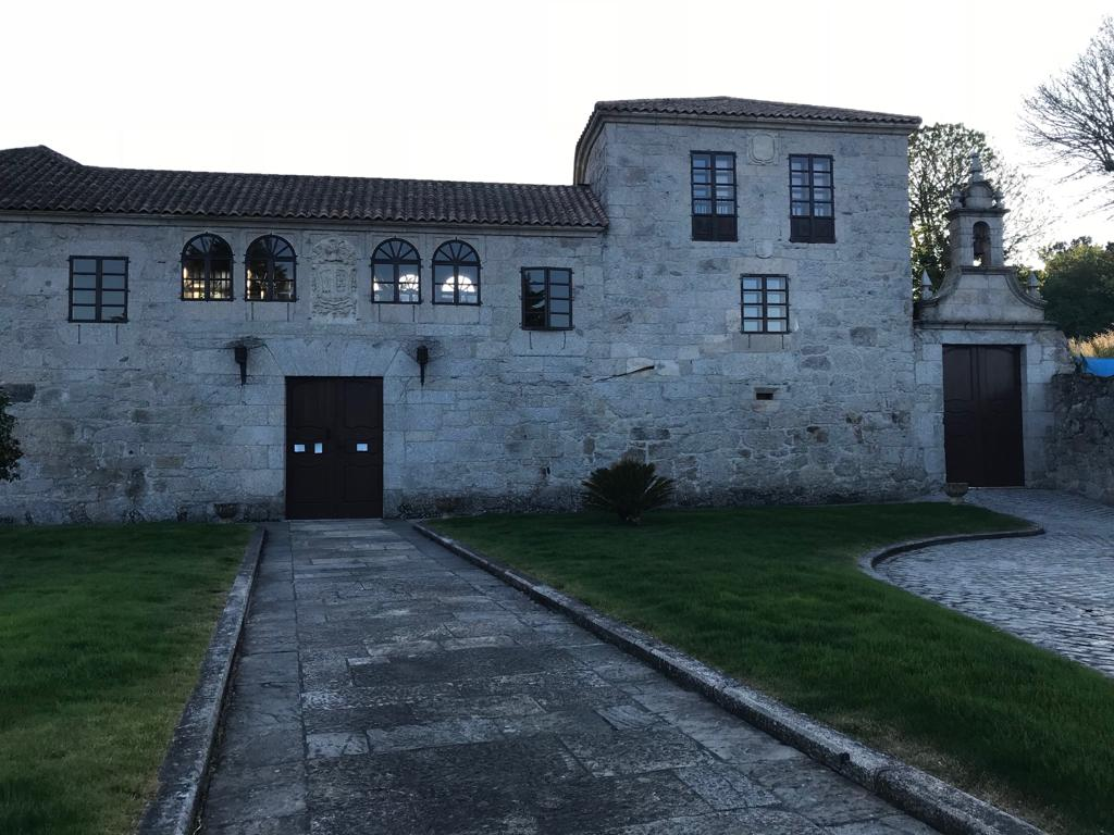 Pazo o casa solariega de Galicia (España).